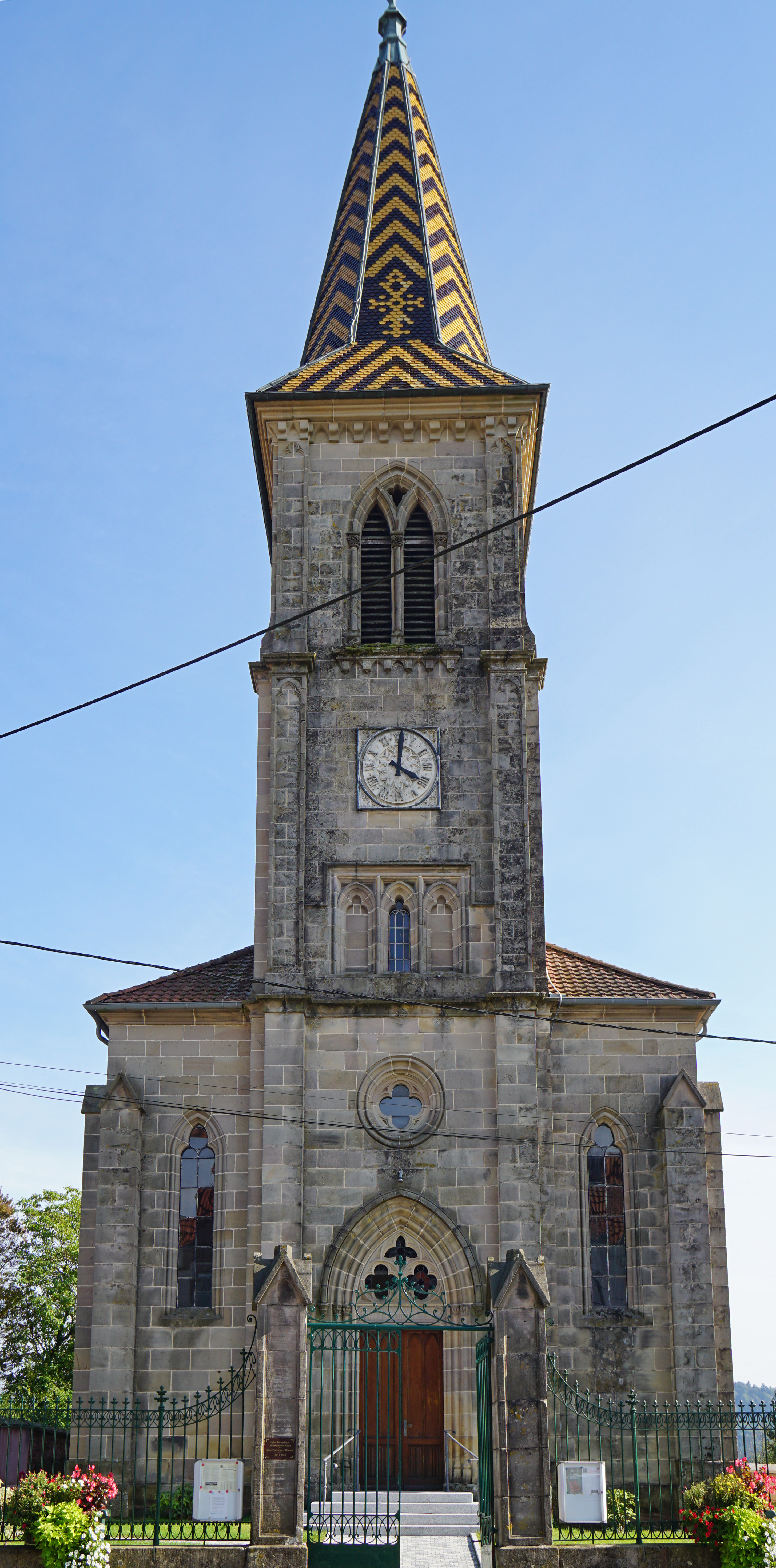 Temple protestant d'Étobon.